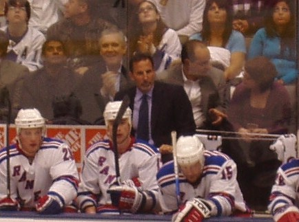 Photo de John Tortorella, recadrée à partir de File:Torts.JPG de Huntingj38.